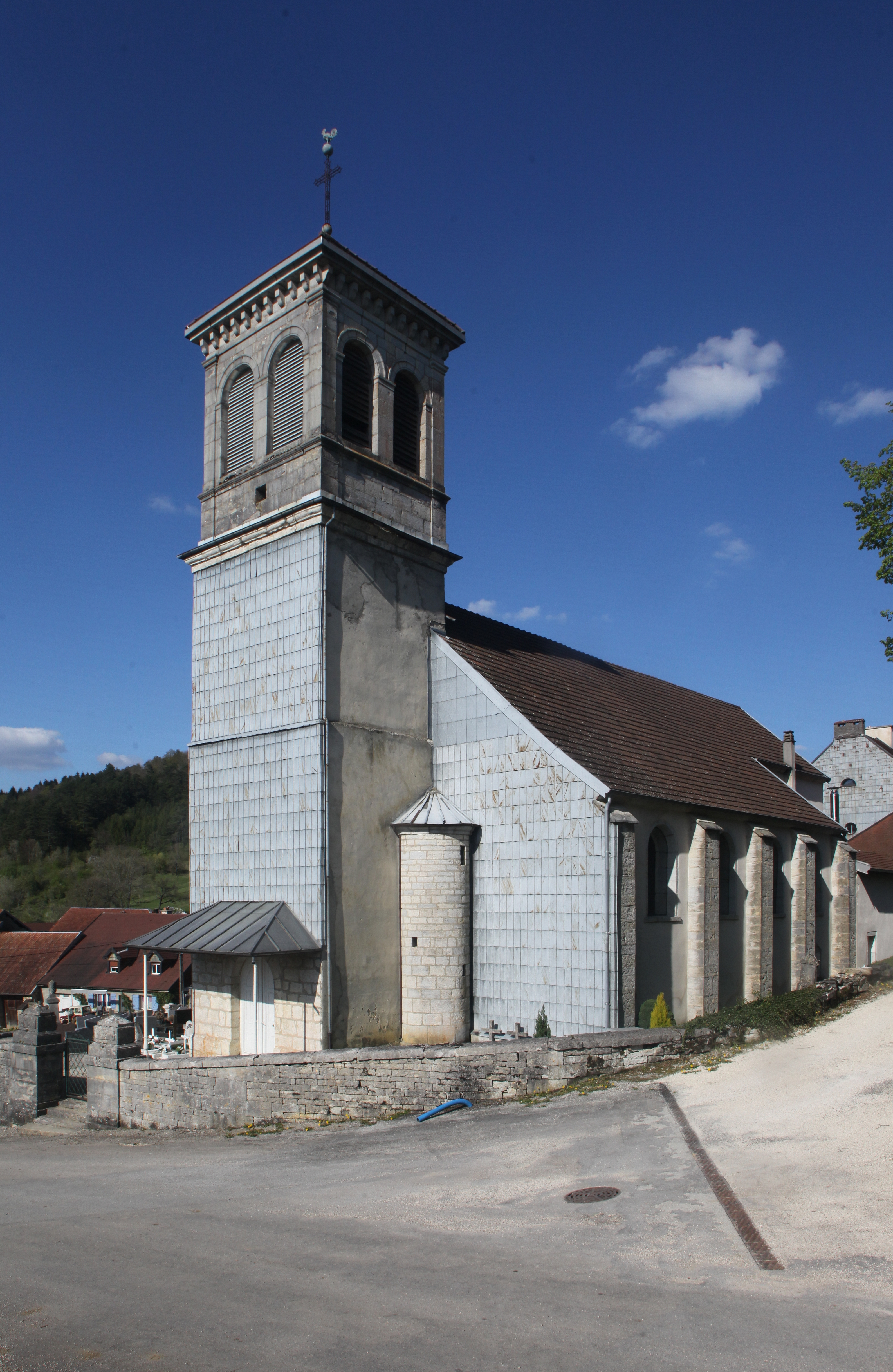 Église de Rurey (Doubs).